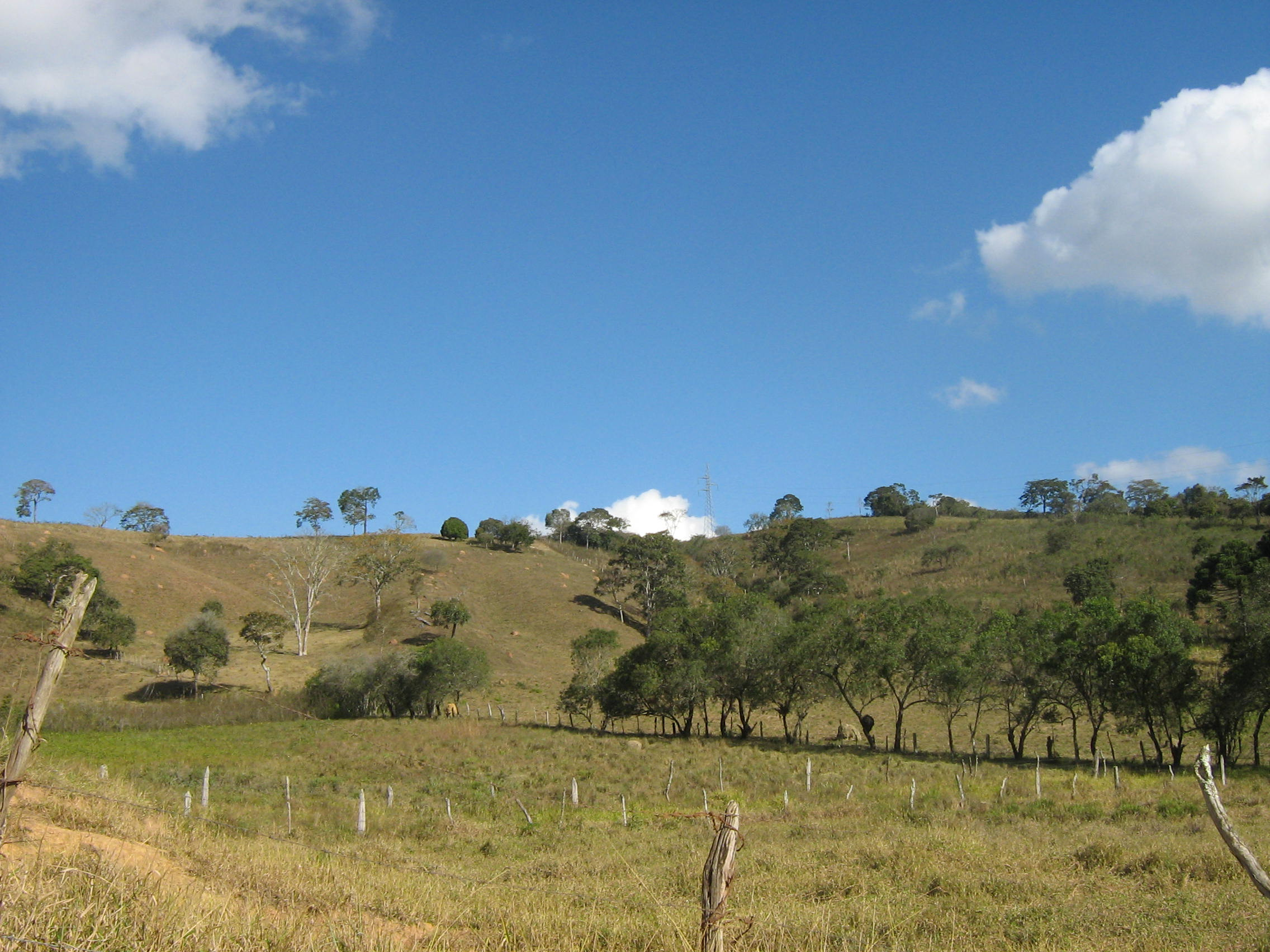 Grota, Arantina MG